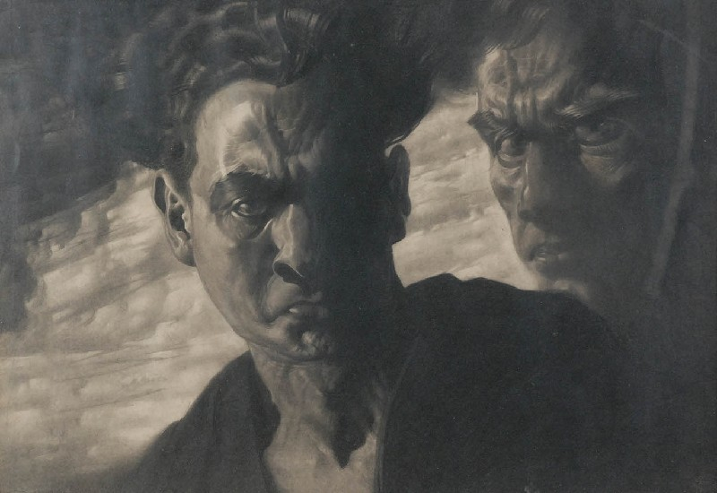 Filozof i jego uczeń, 1931 ołówek, papier kremowy, 44,1 x 62,1 cm; sygn. l.d.: Norbert Strassberg 1931 I / 15 wzdłuż lewej krawędzi u dołu napis ołówkiem: Panu Feilowi Strassberg 1932. Na odwrocie odręczne napisy.